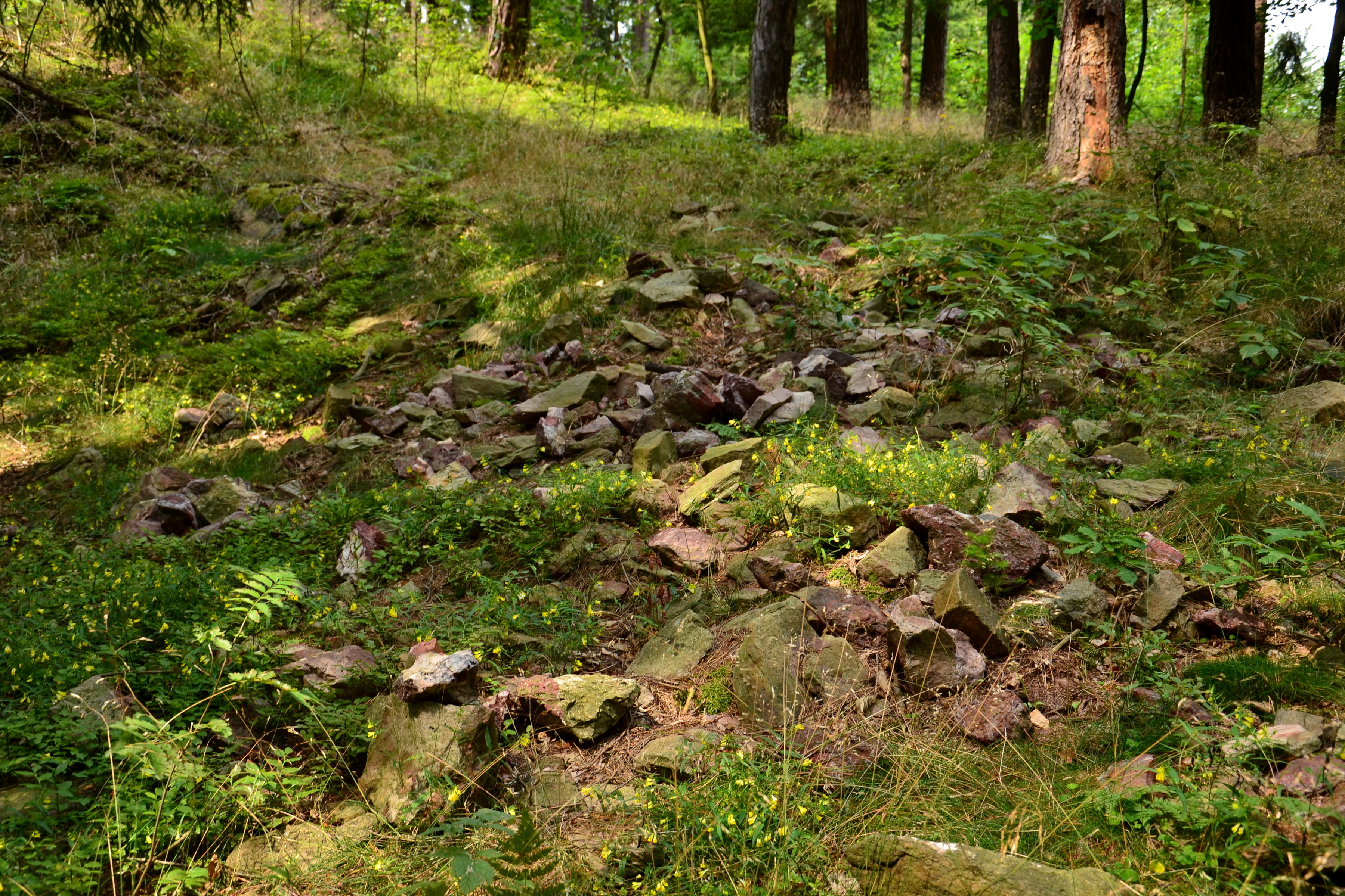 Výskyt jaspisu